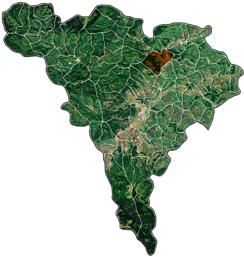 Aiud jud Alba